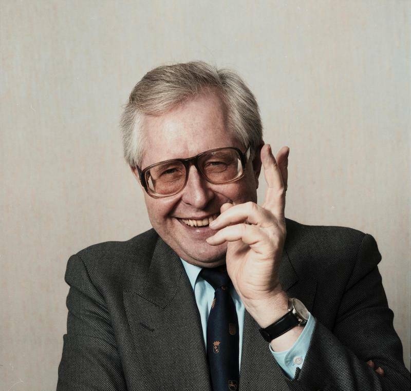 26.2.1988 Dr. Bernhard Vogel, Ministerpräsident des Landes Rheinland-Pfalz, Präsident des Bundesrates 1987/88